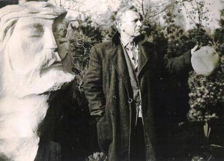 Luboš Hruška na Meditační zahradě před sochou Jeruzalémských žen